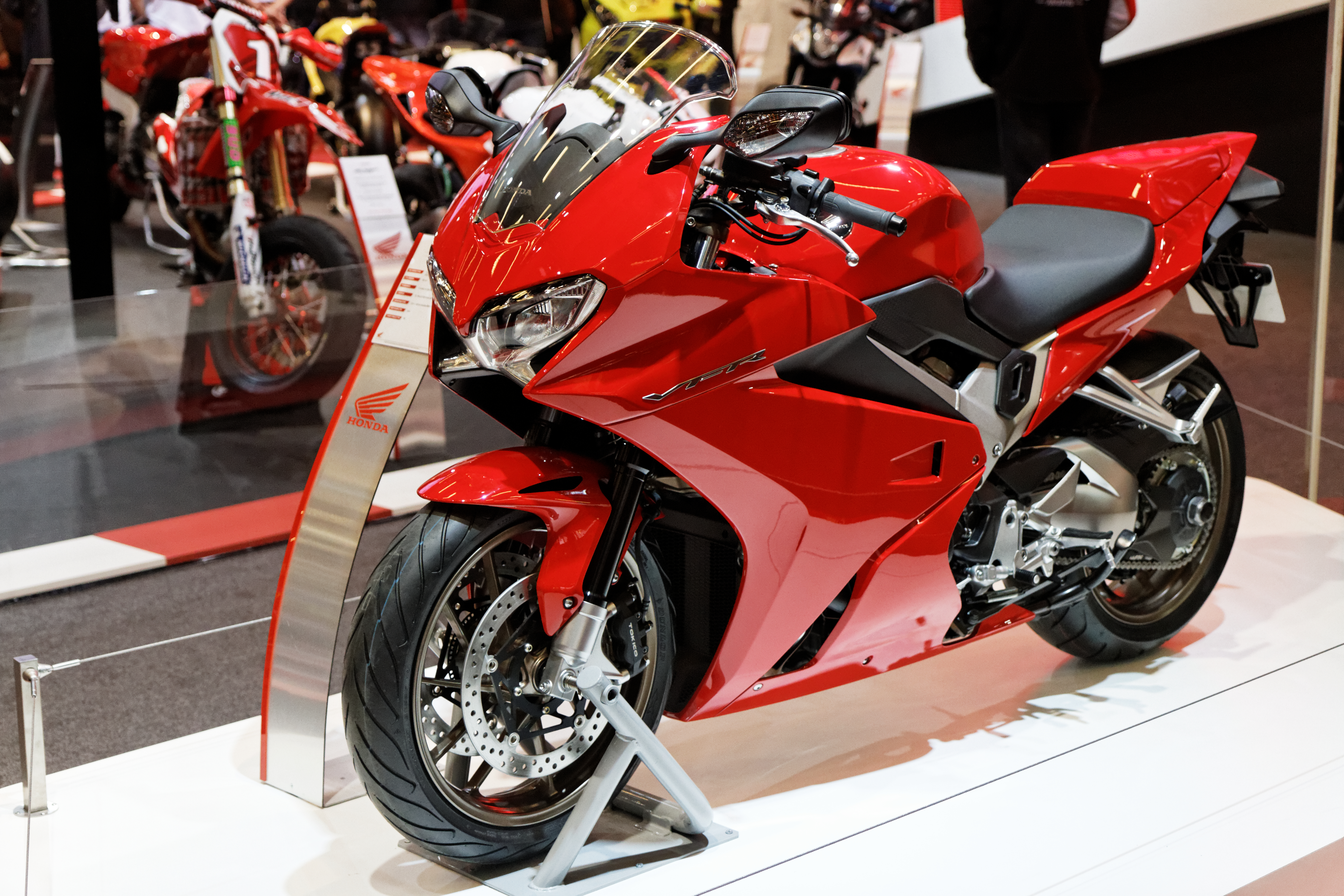 Une Honda VFR présentée lors du salon de la moto 2013.